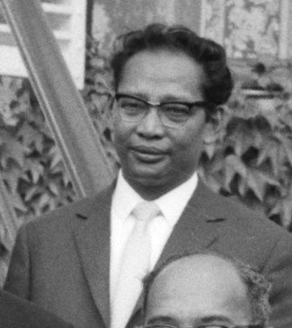 Collectie / Archief : Fotocollectie Anefo Reportage / Serie : [ onbekend ] Beschrijving : RTC-leden op Paleis Soestdijk . Korthals, Bernhard, Jonkheer, Koningin, Kraag, Emanuels Datum : 6 juni 1961 Trefwoorden : koninginnen Persoonsnaam : Bernhard (prins Nederland), Emanuels, Kraag, Johan Instellingsnaam : RTC Fotograaf : Bilsen, Joop van / Anefo Auteursrechthebbende : Nationaal Archief Materiaalsoort : Negatief (zwart/wit) Nummer archiefinventaris : bekijk toegang 2.24.01.04 Bestanddeelnummer : 912-5730